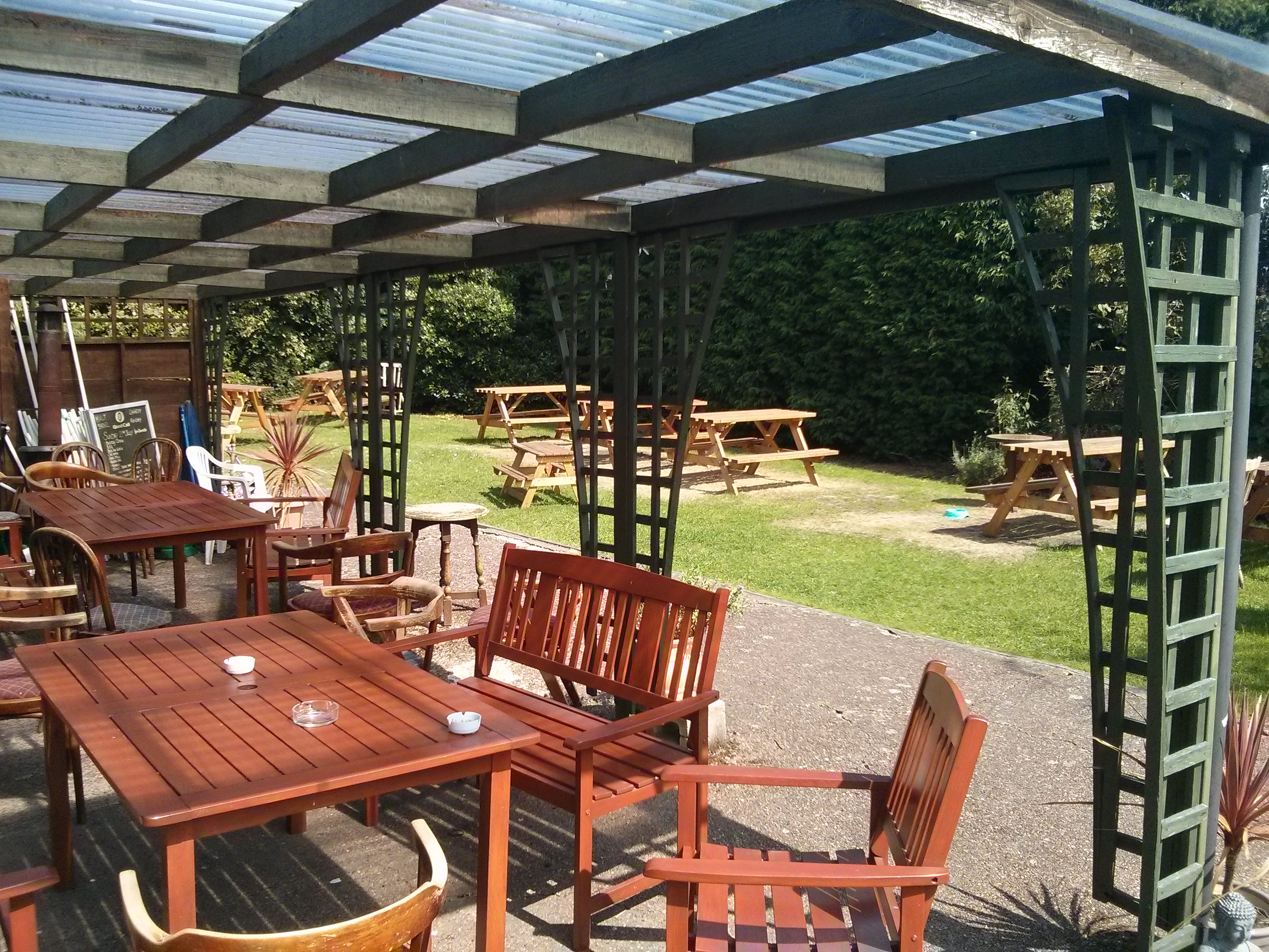 Garden Malt Shovel Spondon Derbyshire